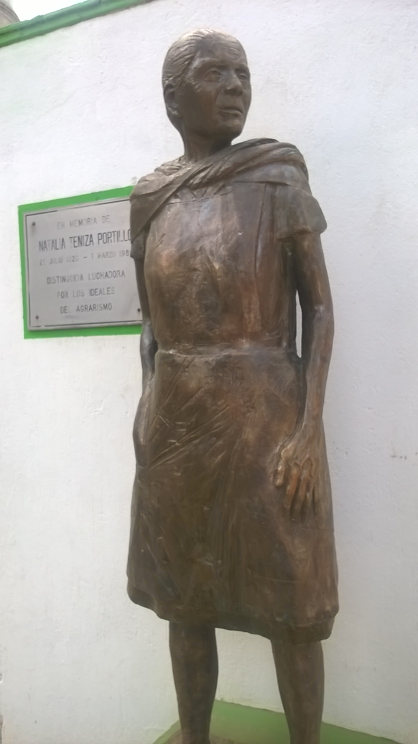 Natalia Teniza Portillo